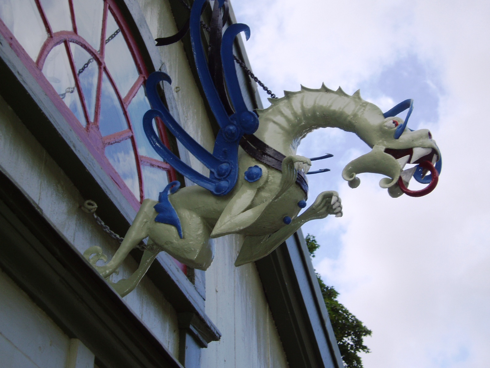 detalj vid huset Drakegården, Sigtuna.